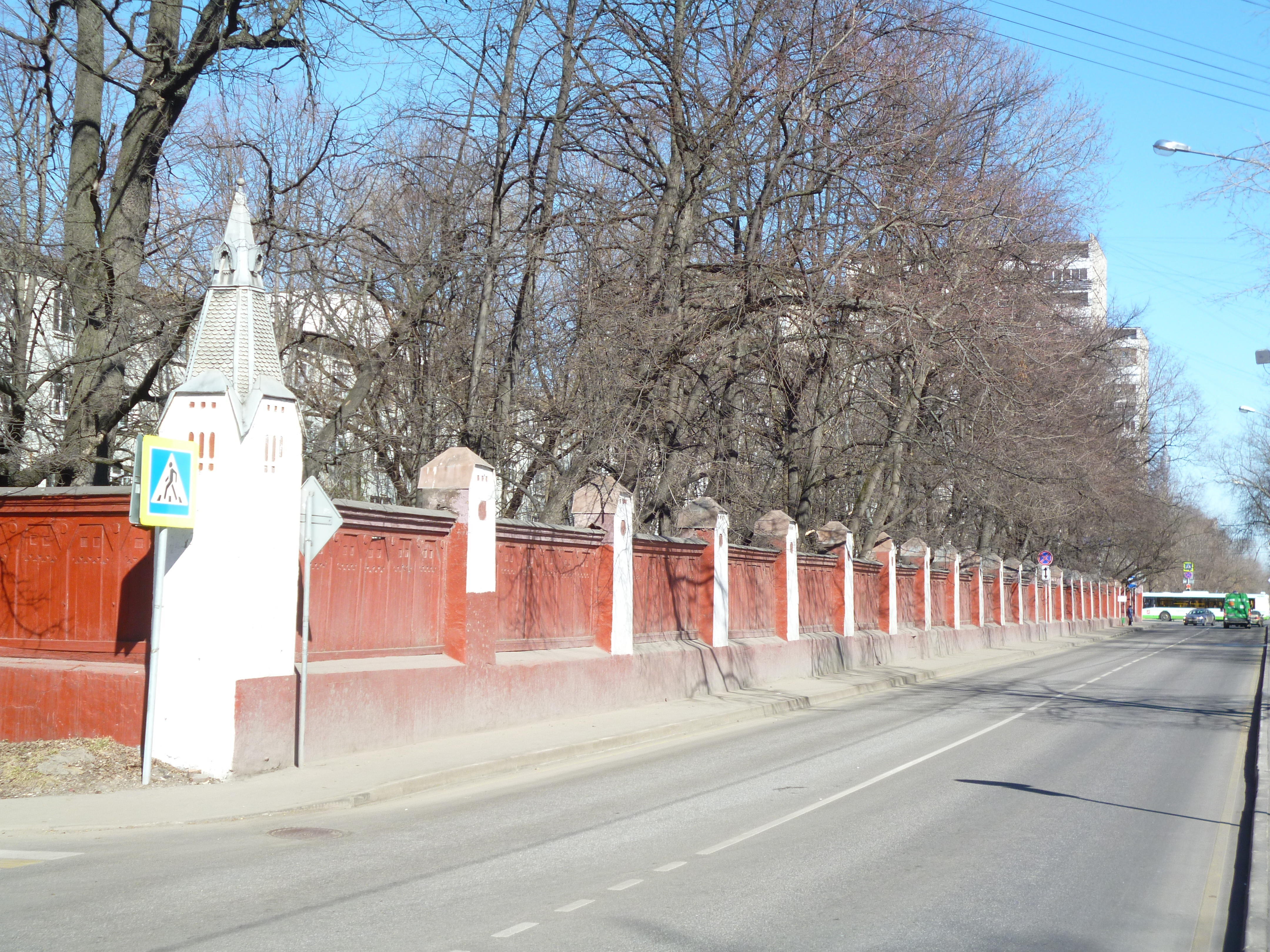 Ограда дачи Коншиной (санатория для увечных воинов): 8 Марта ул., д.1, стр.24, Аэропорт, Северный округ, Москва